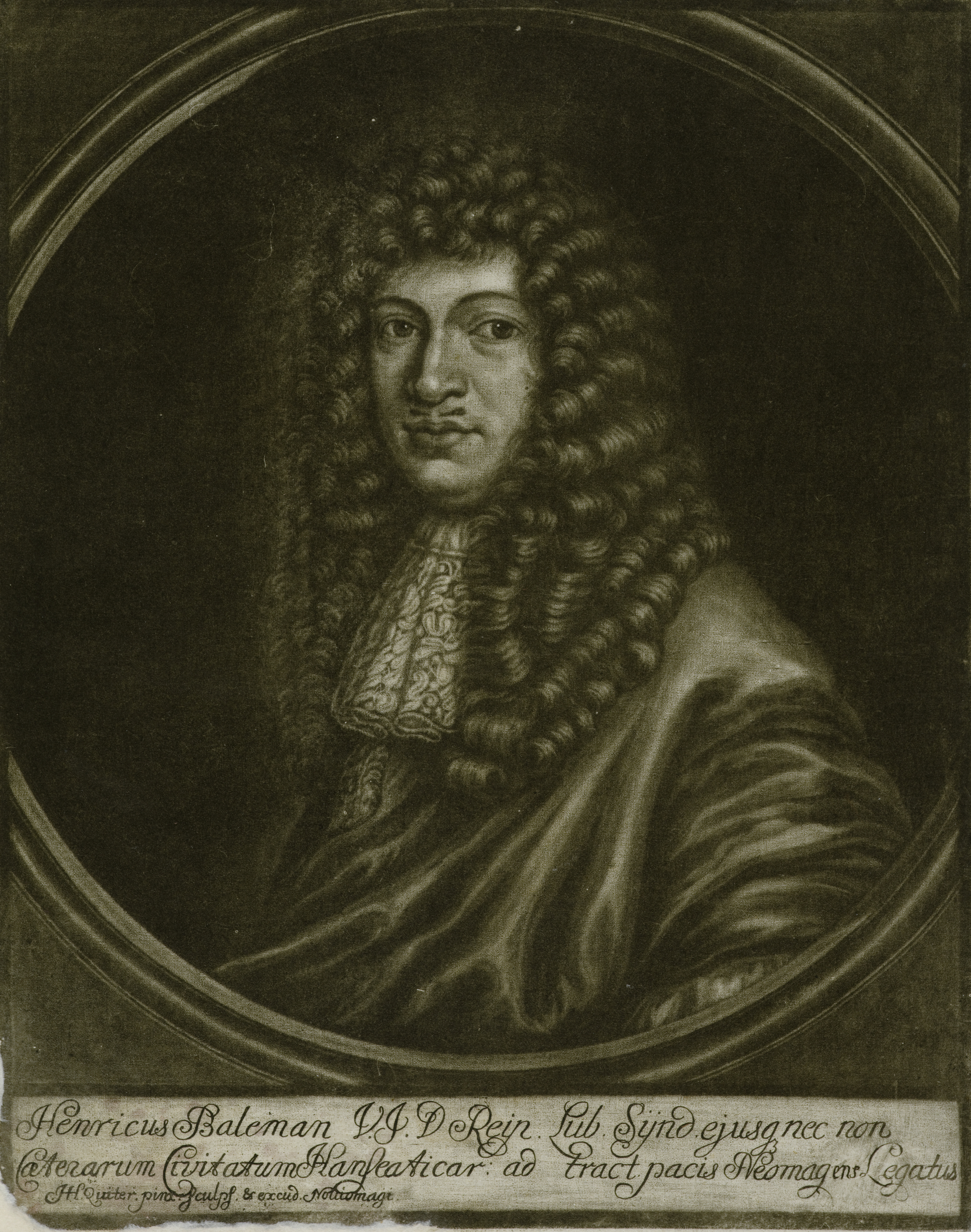 Henricus Balemann